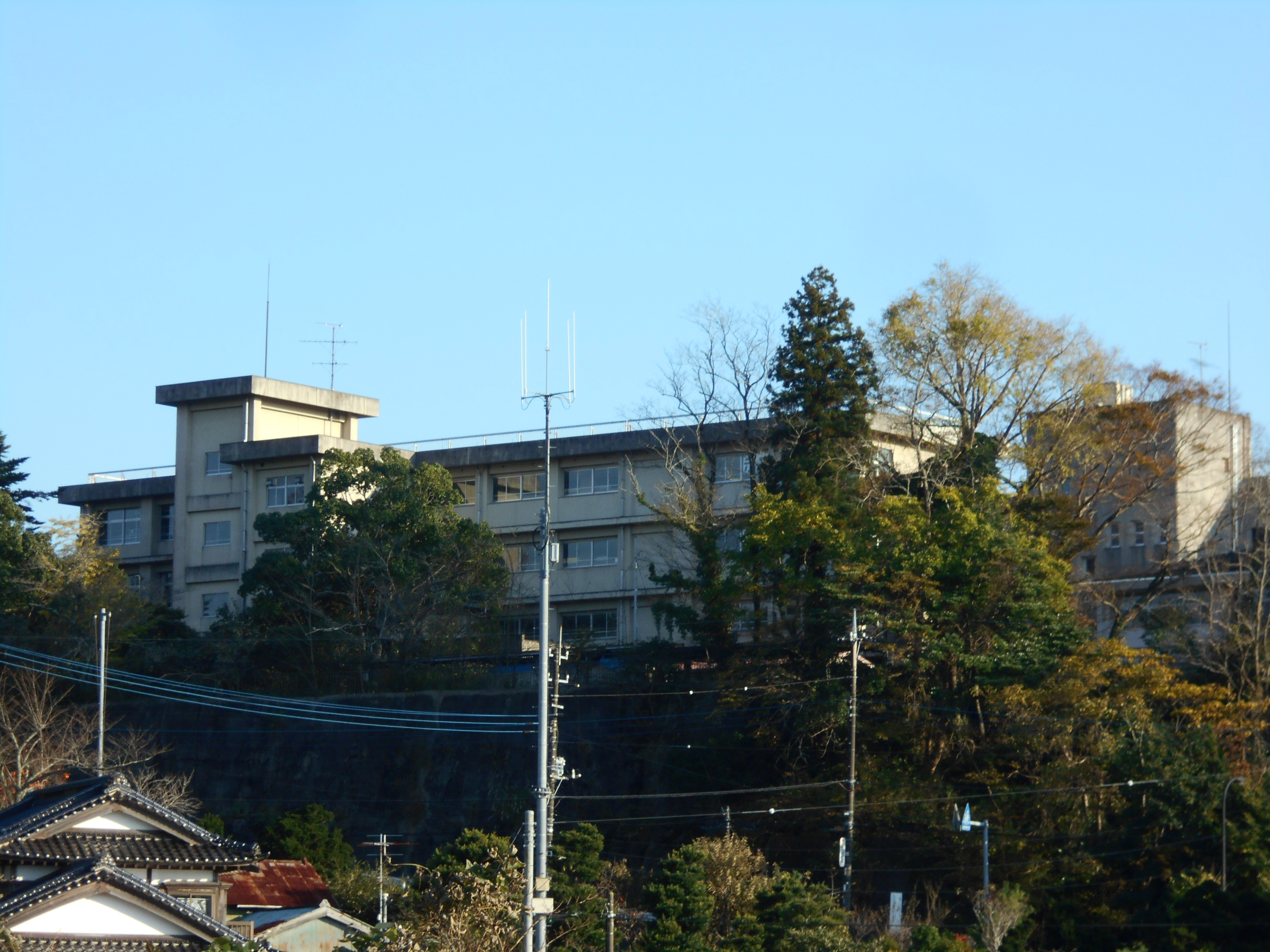 千葉県立大多喜女子高等学校